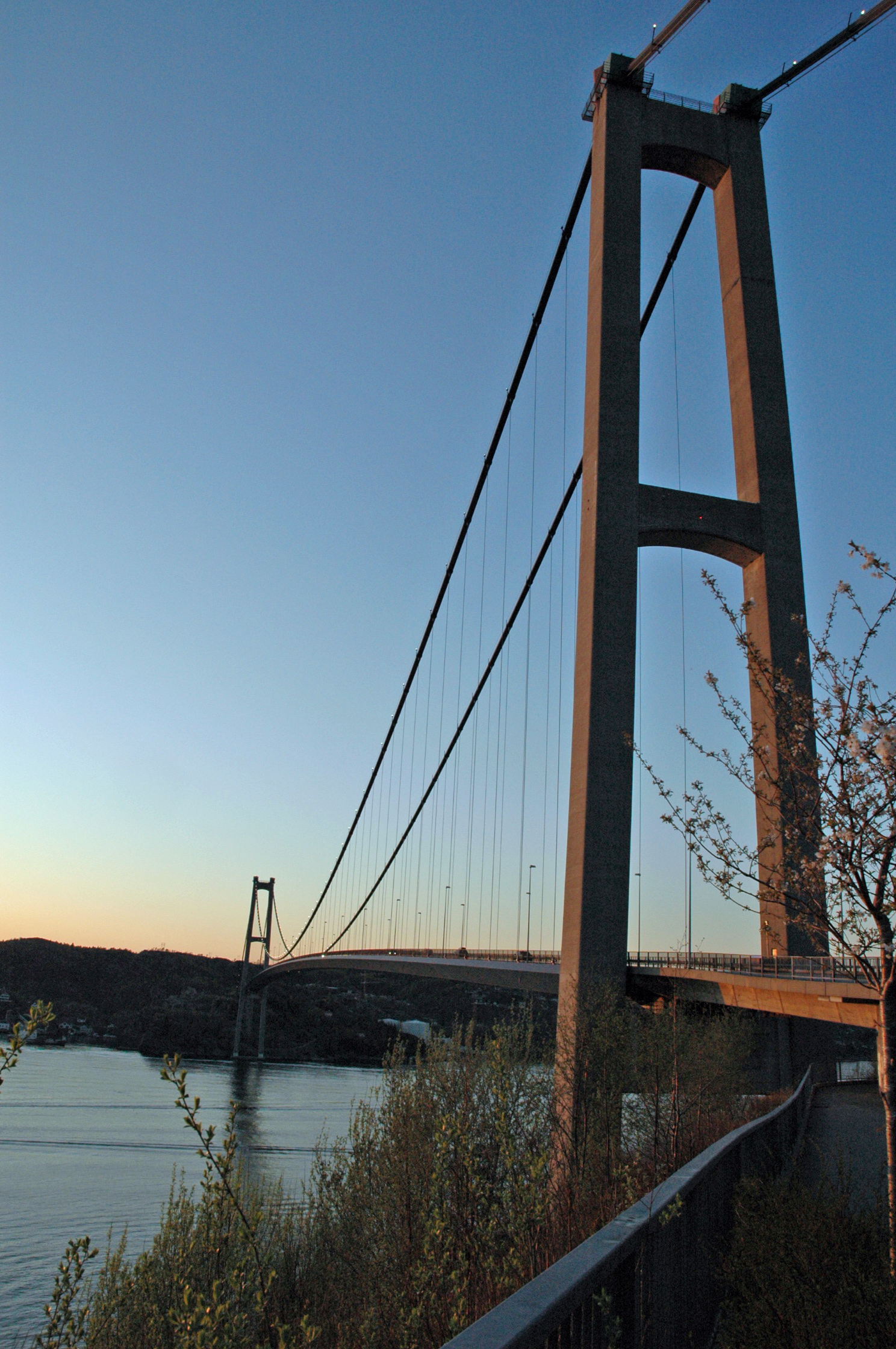 Askøybroen